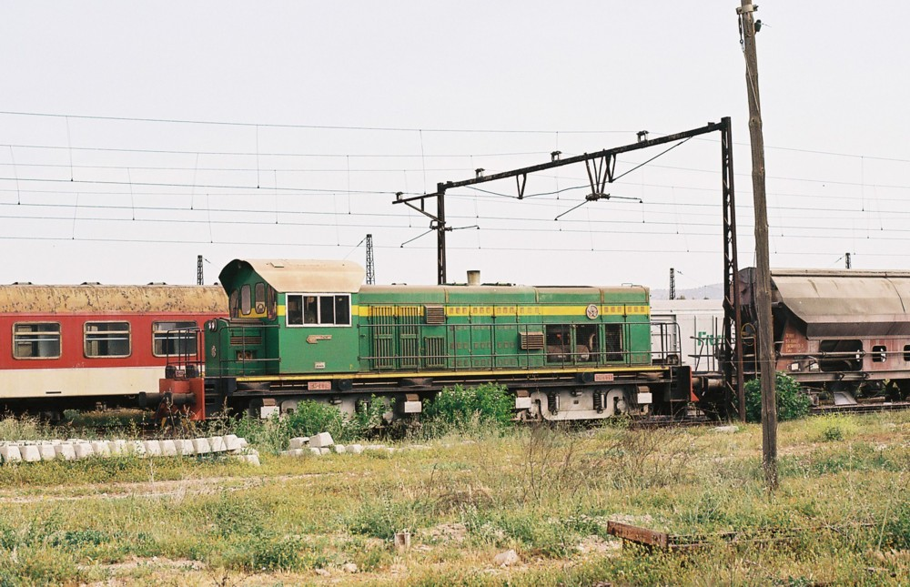 ONCF DM 602 à Fès